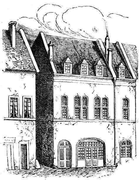 Maison natale de Fourier à Besançon, dans la Grand'rue, à l'angle sud de l'ancienne ruelle Baron (remplacée en 1841 par la rue Moncey).